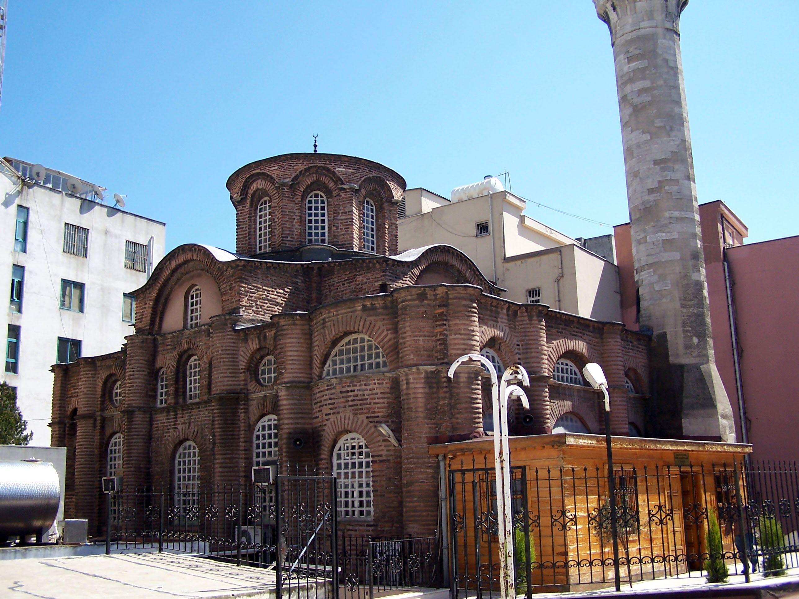 Bodrum Mesihpaşa Camii in Laleli.